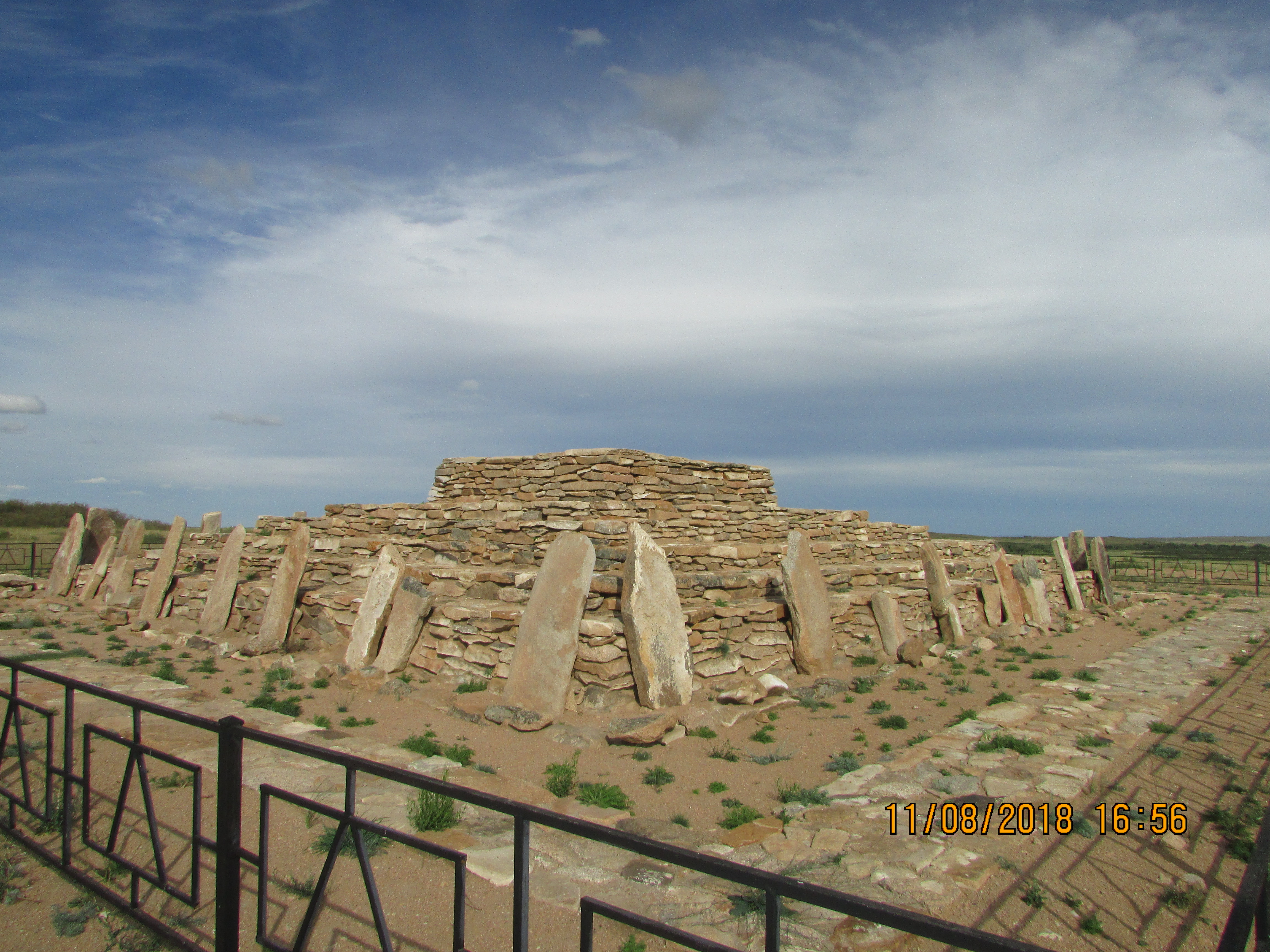 Могильник Каражартас с далека. Бронзового века в Шетском районе 15 век д.н.э